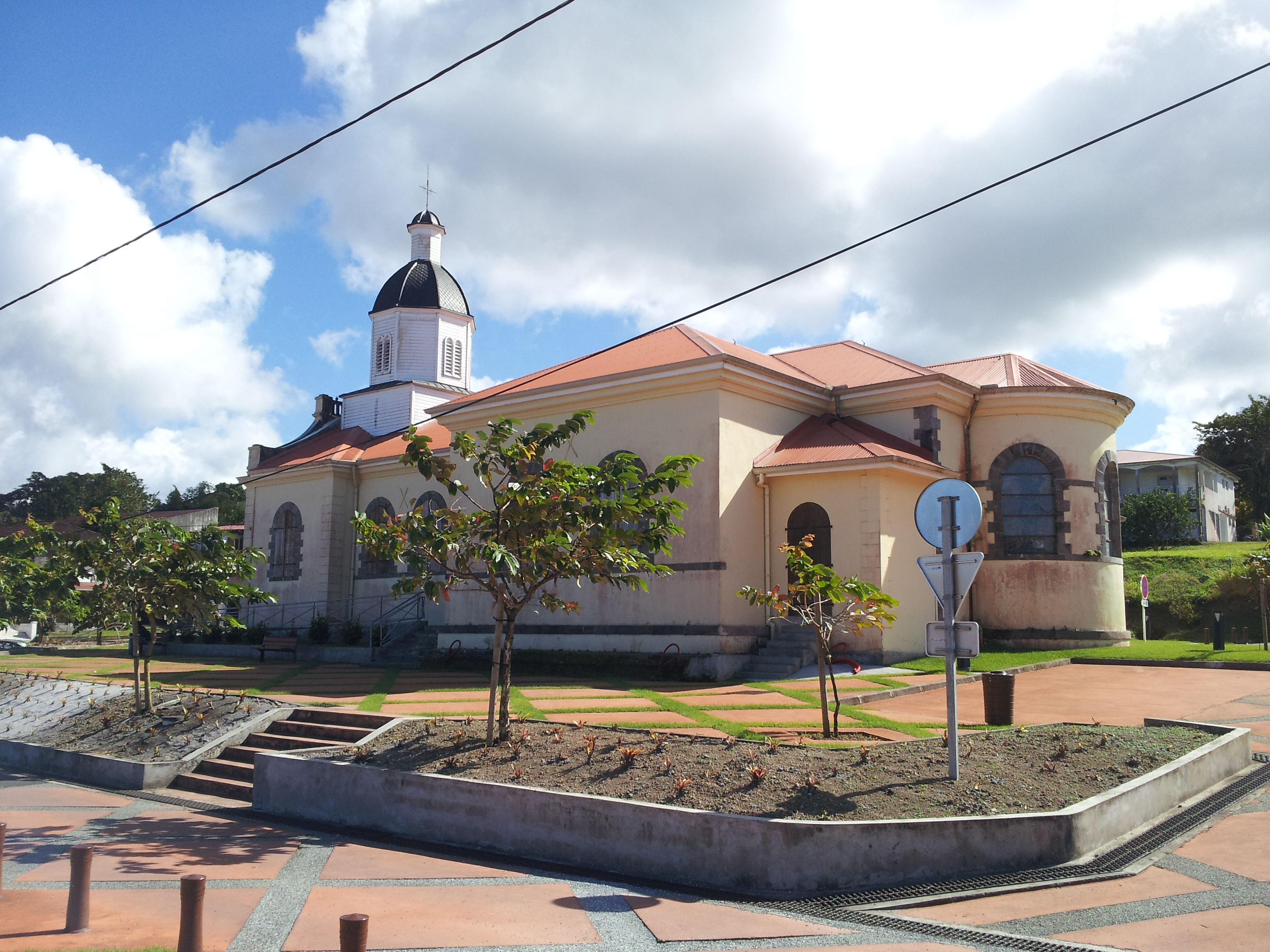 Arrière de l'église de l'Immaculée-Conception de L'Ajoupa-Bouillon